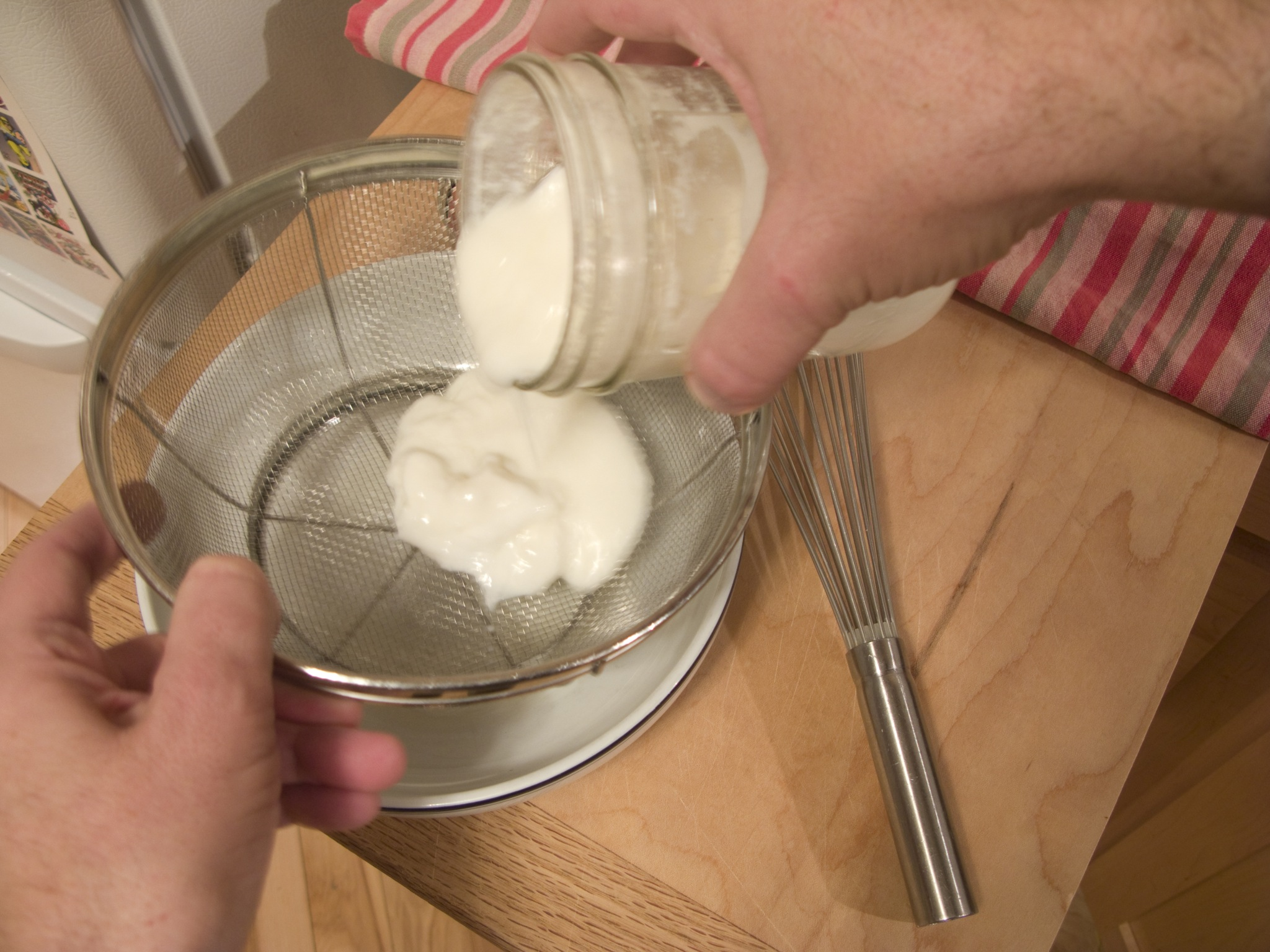 Posteriorment, es filtra la llet per tal que en el filtrat quedin els grans de quefir i es puguin recuperar.